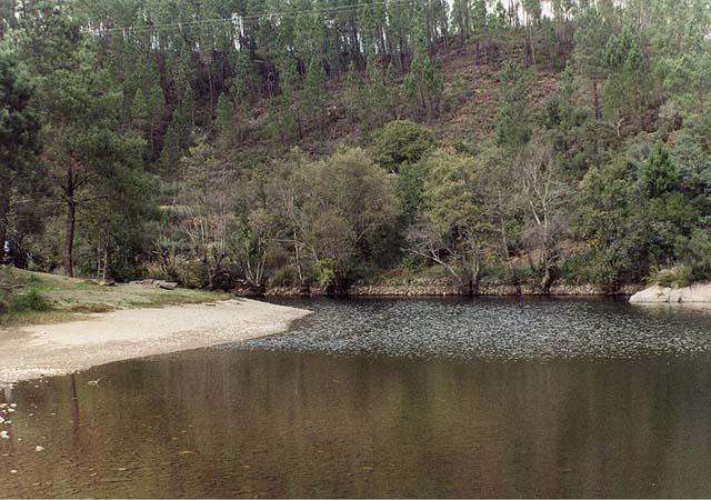 Ribeira do Alvito.